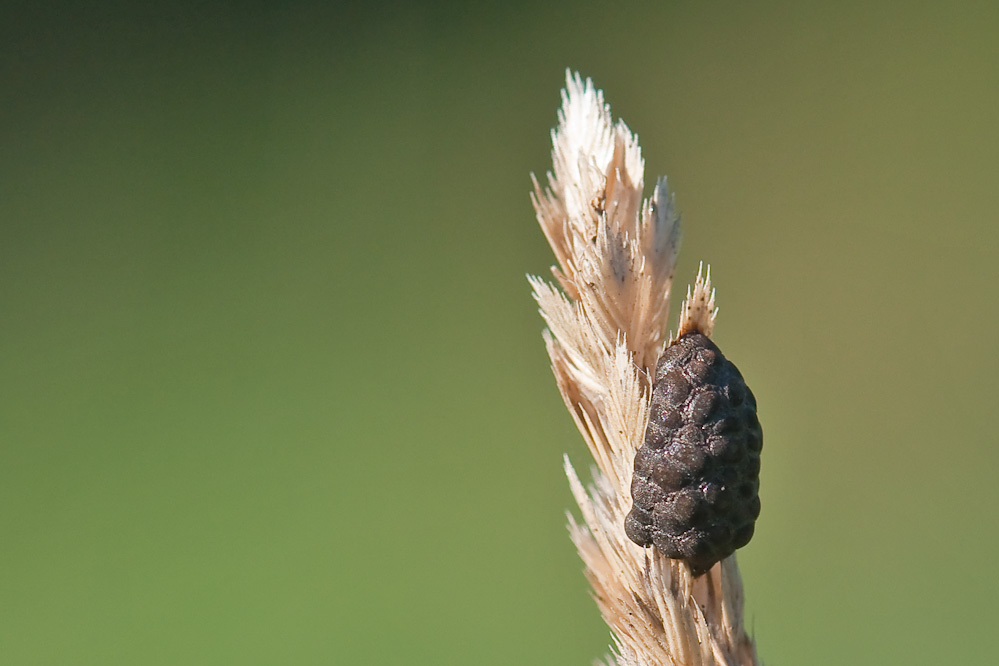 Ei-Gelege des Rainfarn-Blattkäfers an Kammgras-Blütenstand. Heuberg (Bad.-Württ.), 24.09.2011